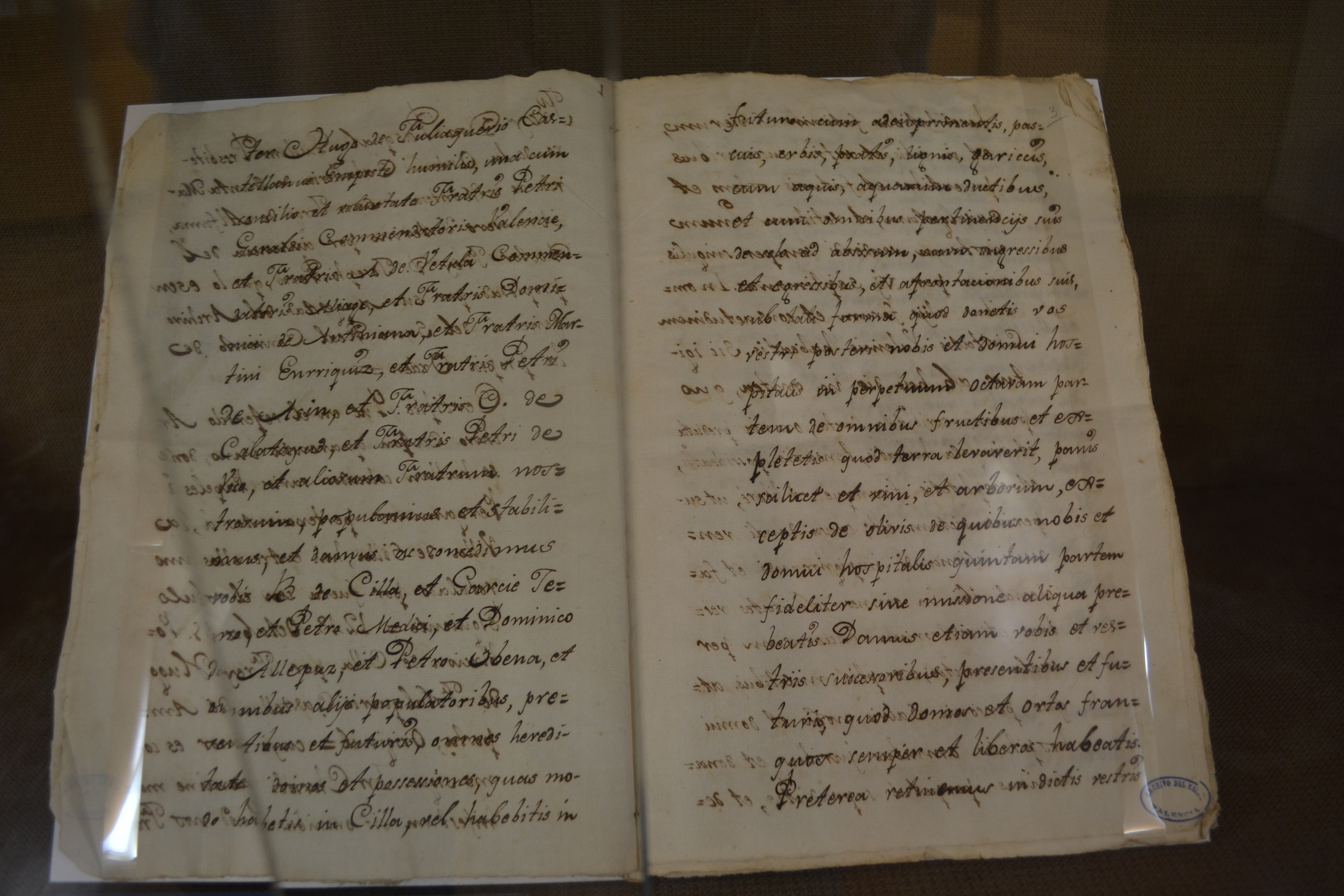 Fra Hug de Fullalquer, Mestre de l'Orde de l'Hospital i Castellà d'Aposta, concedeix carta pobla las crsitians que si han instal.lat a Silla, a fur de València (31 d'octubre de 1243). ARV: Batlia, Llibres, apèndix, núm. 260, fol. 1 (còpia de 4 de desembre de 1790). Arxiu del regne de València.